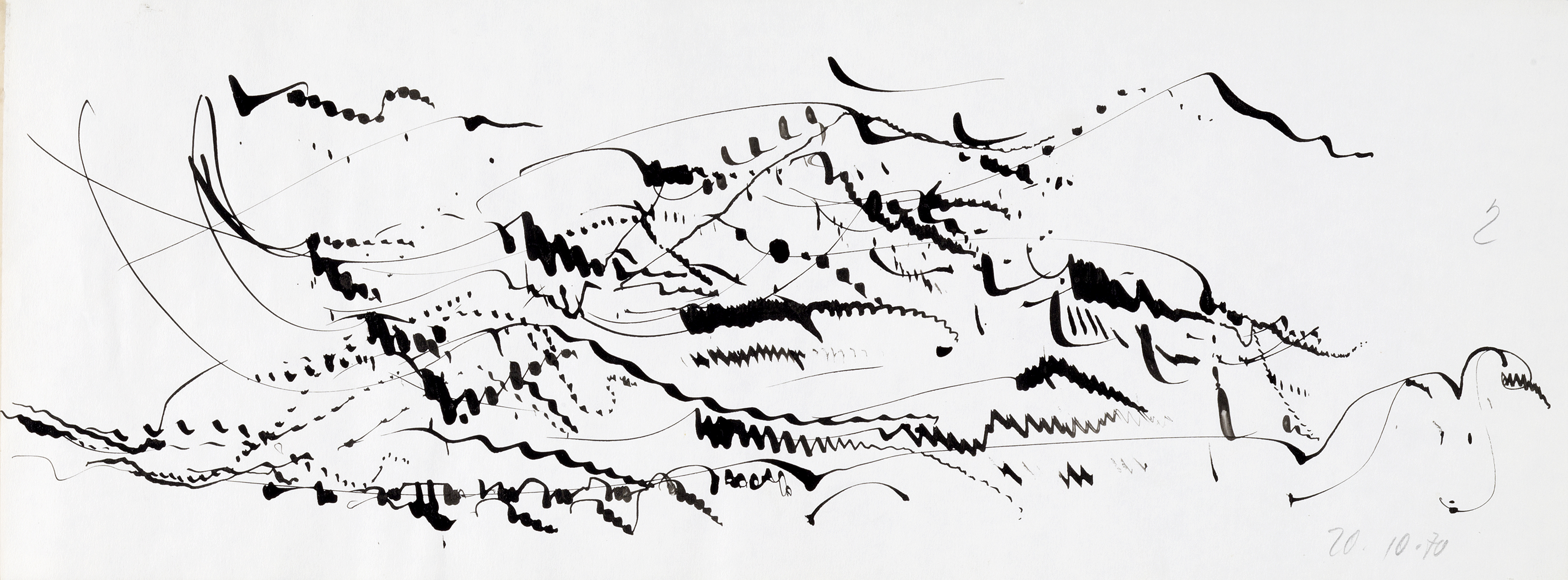 Vorlage zu einer Improvisation